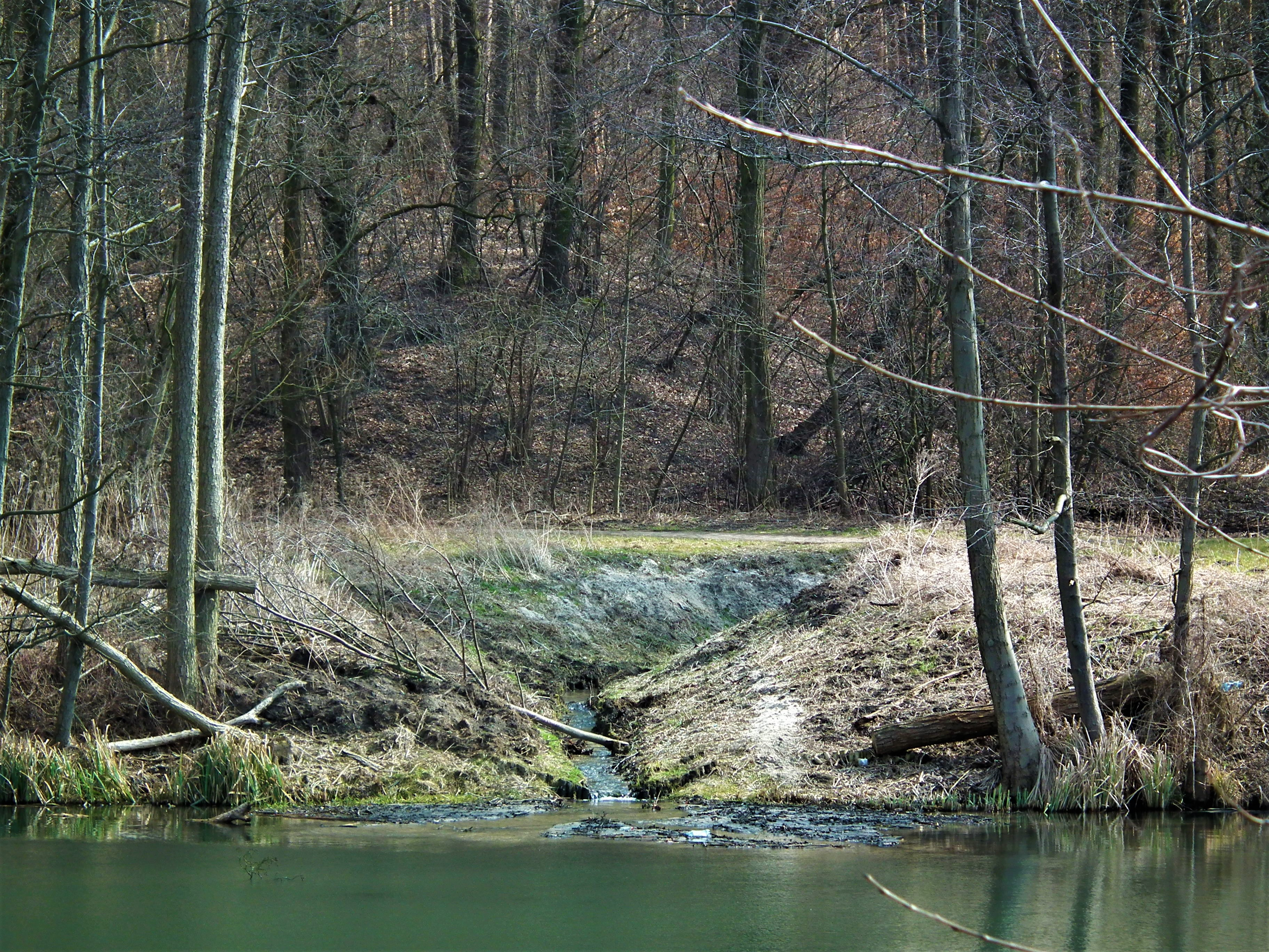 Ciek Darzynka w Poznaniu - w pobliżu ujscia do Stawu Browarnego w Kobylepolu.